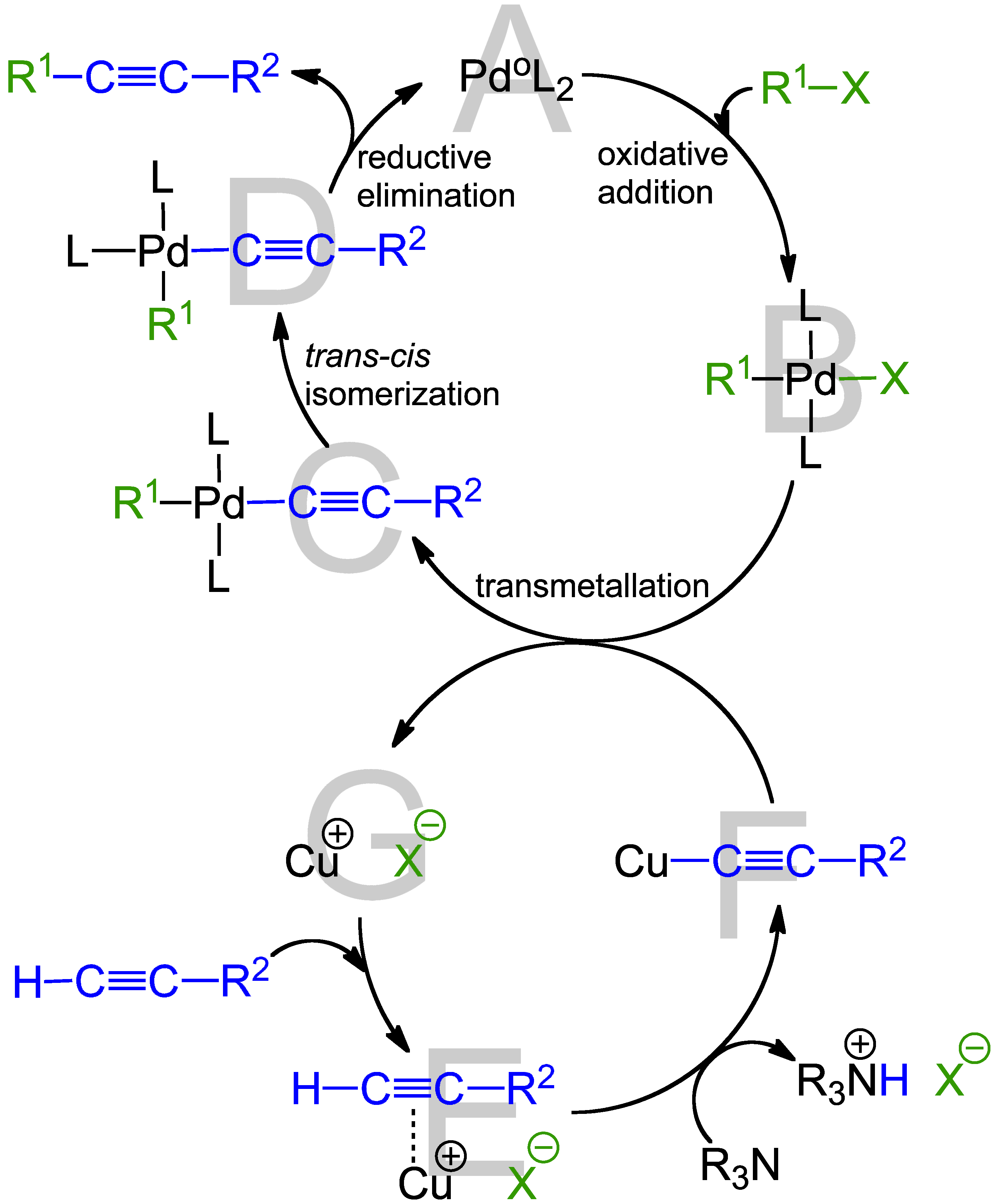 kleine Korrektur gegenüber V1